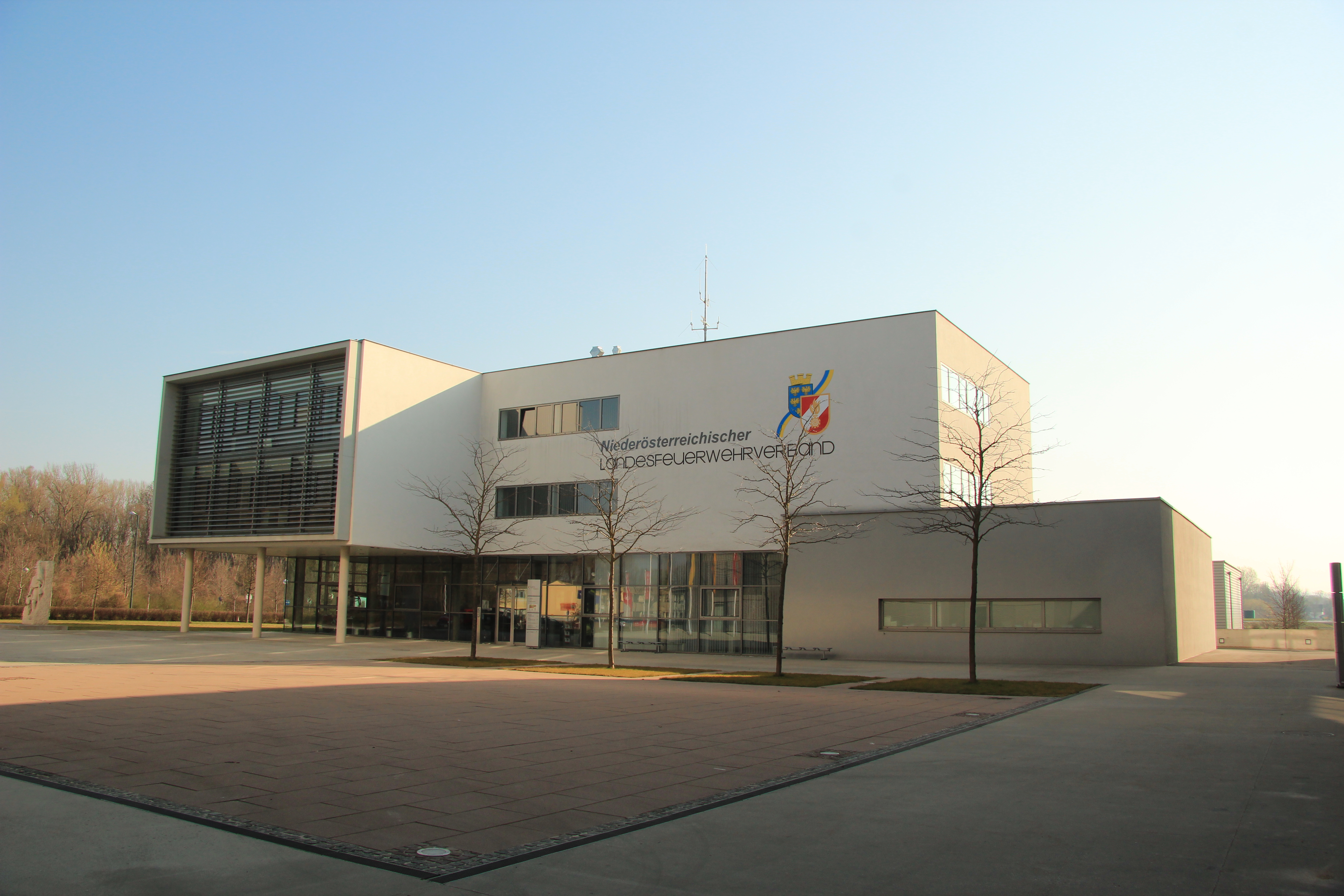 NÖ Landesfeuerwehrverband und Landesfeuerwehrschule in Tulln)